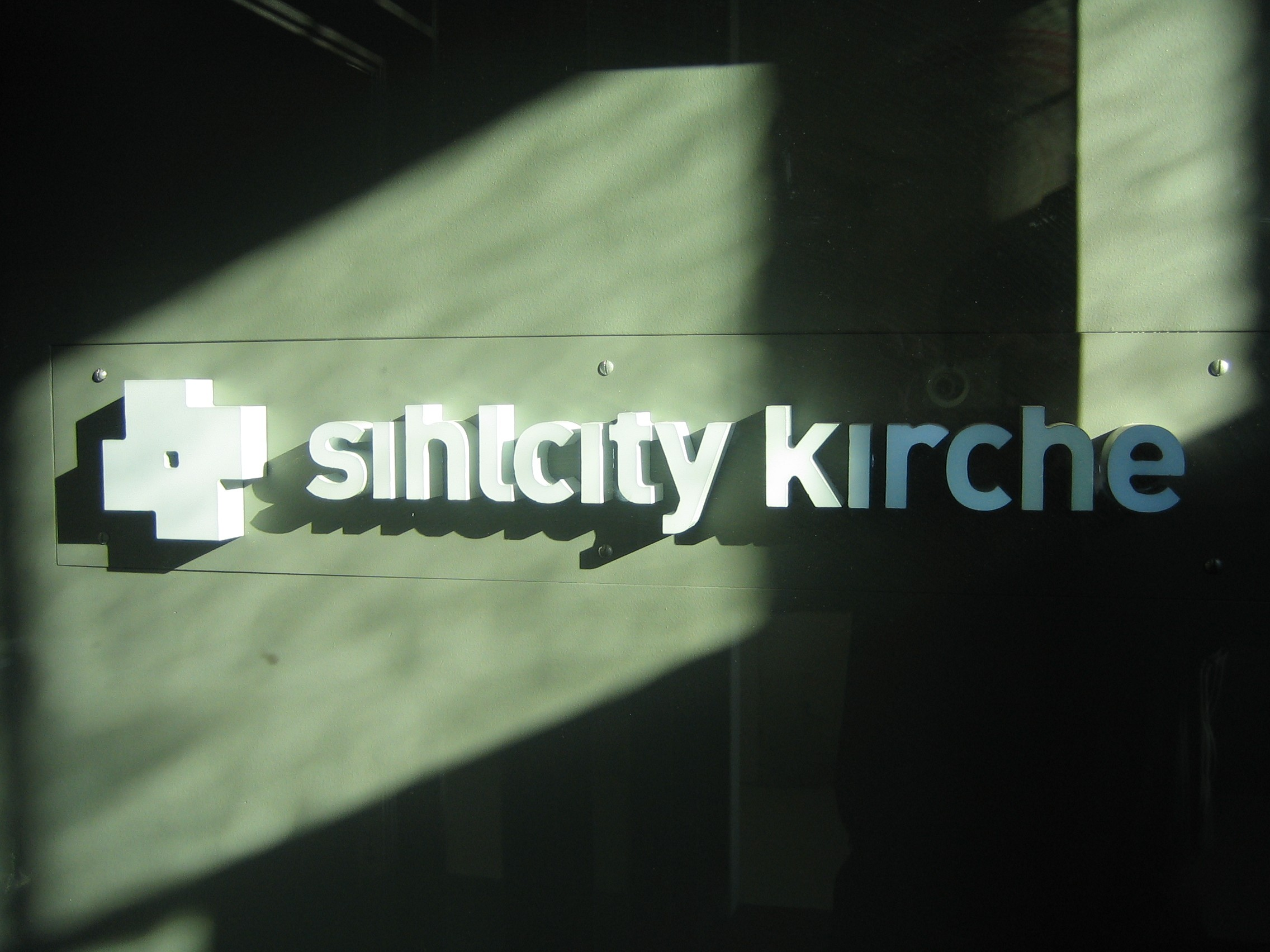 Anschrift der Sihlcity-Kirche in Zürich. - Foto: Jakob Vetsch, 31. März 2007.